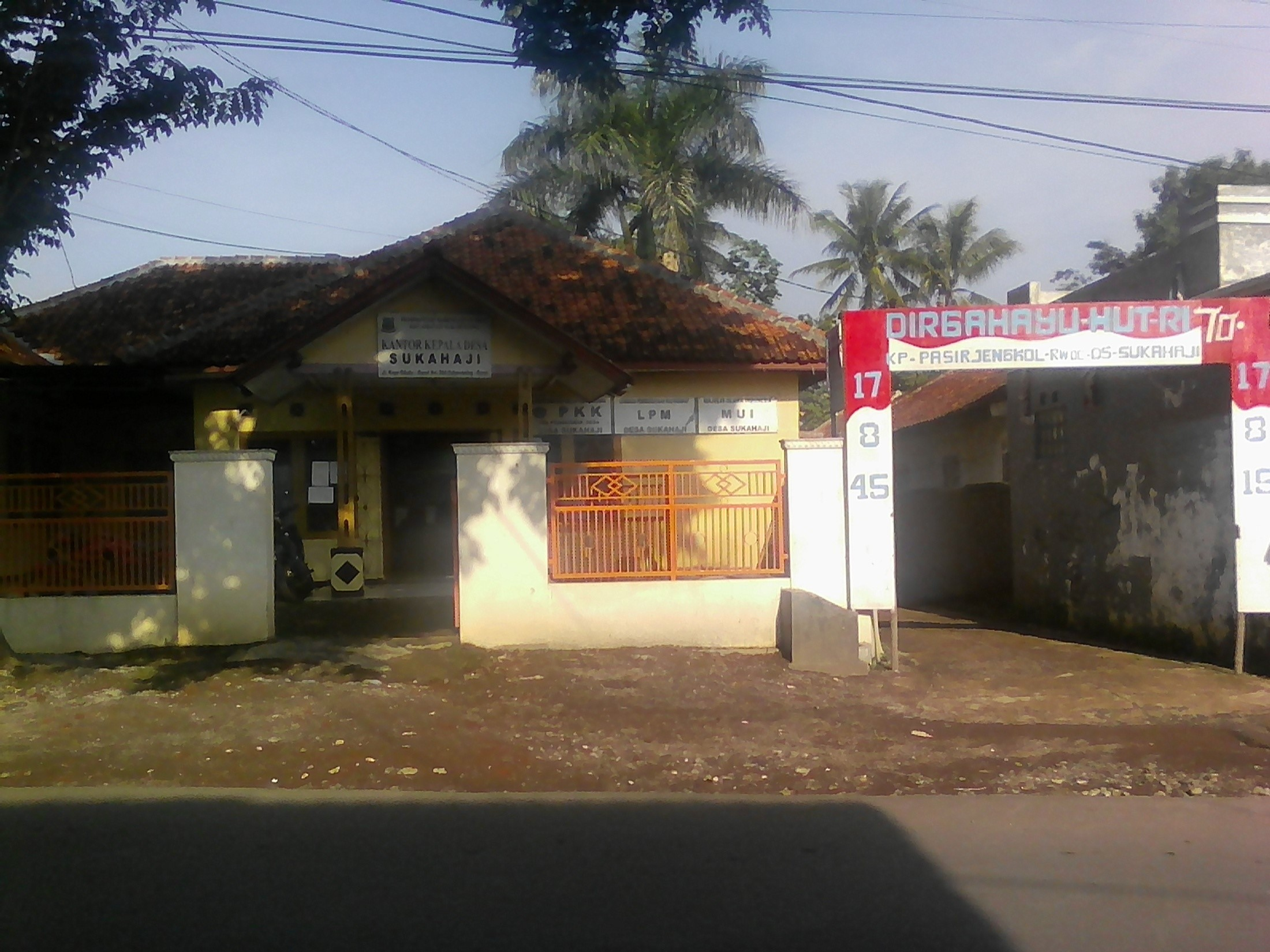 DESA SUKAHAJI